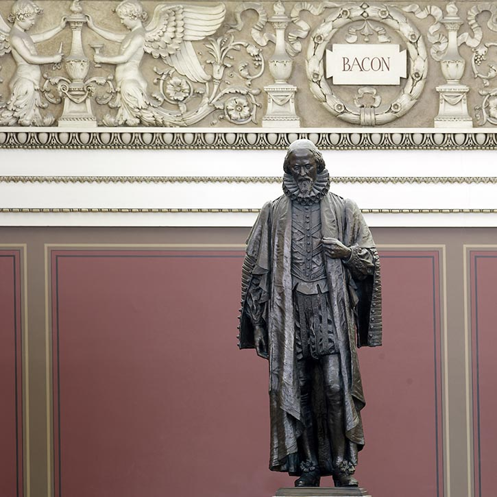 Estátua de Francis Bacon na Biblioteca do Congresso dos EUA.